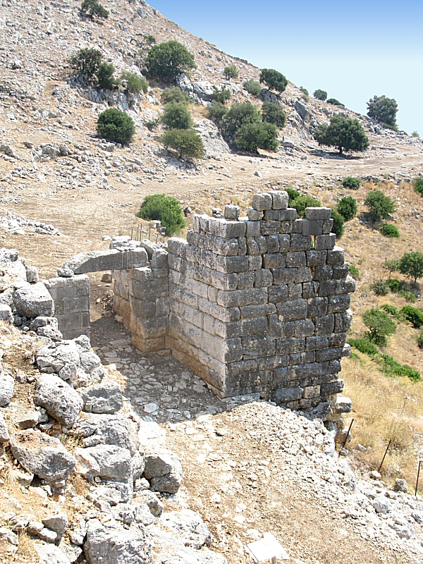 Αρχαία Πάλαιρος, η κύρια πύλη σταη Ν.Δ. πλευρά της οχύρωσης